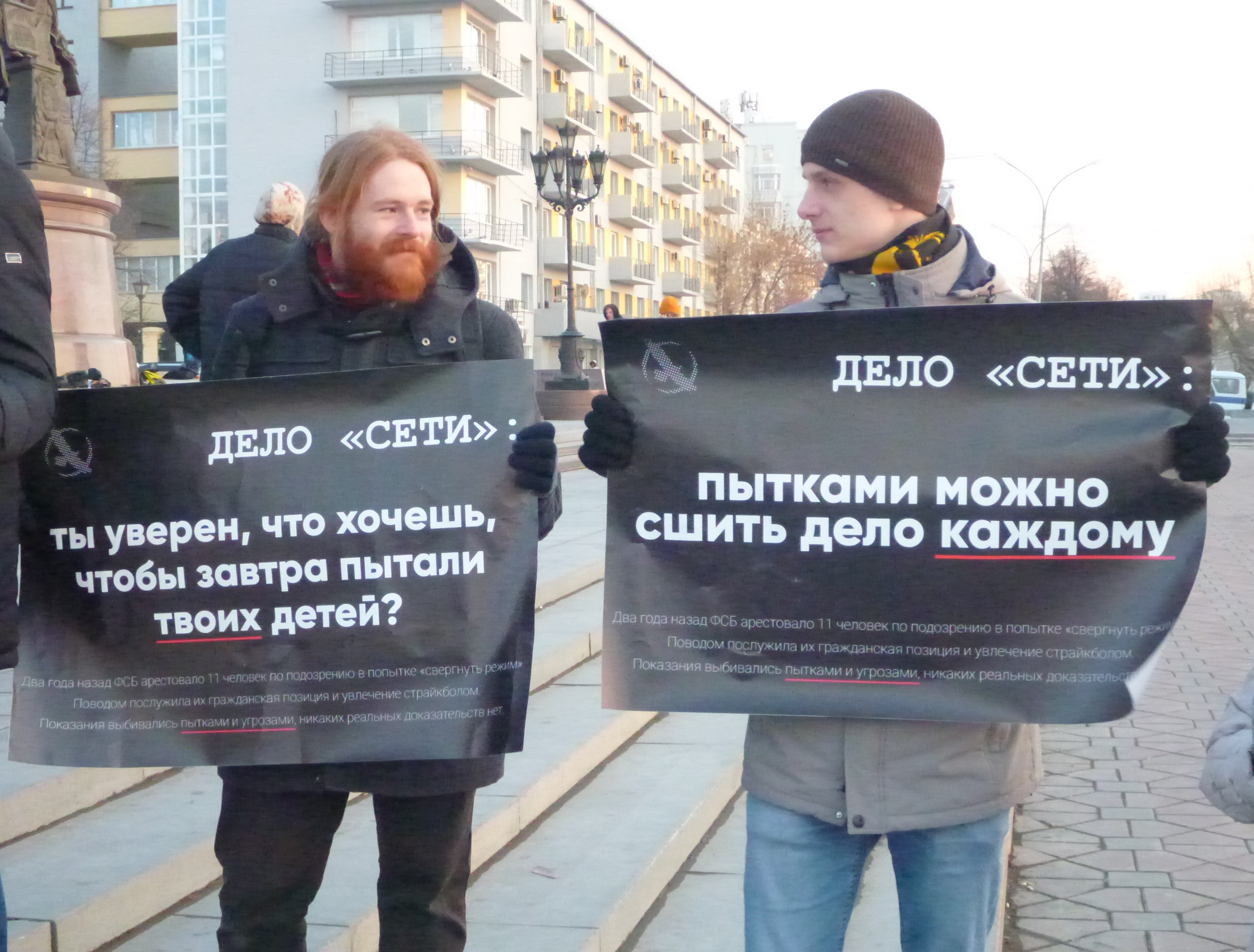 Пикетчики за дело сети Екатеринбург 6 марта 2020 года